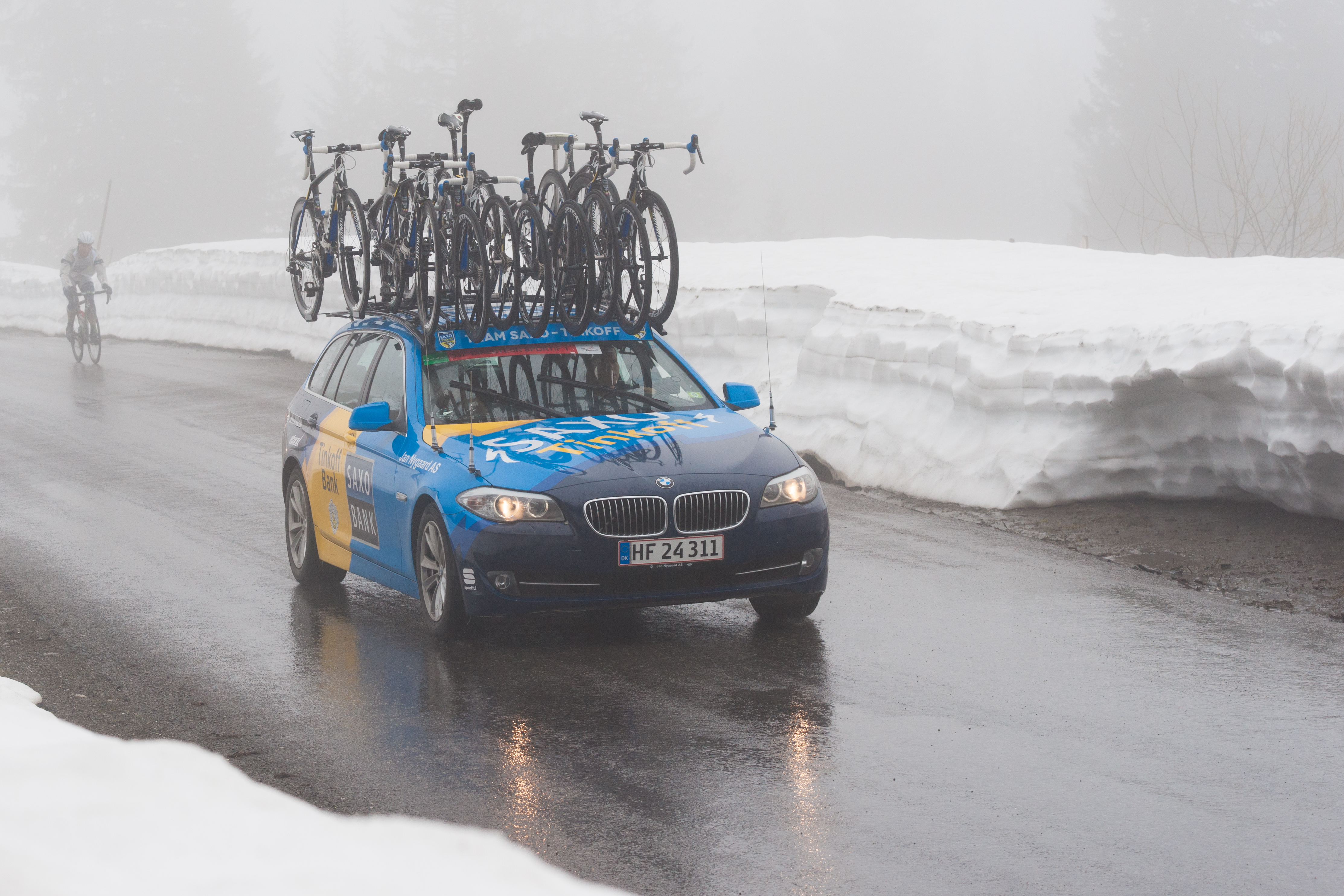 Tour de Romandie 2013, 4ème étape, col de la Croix